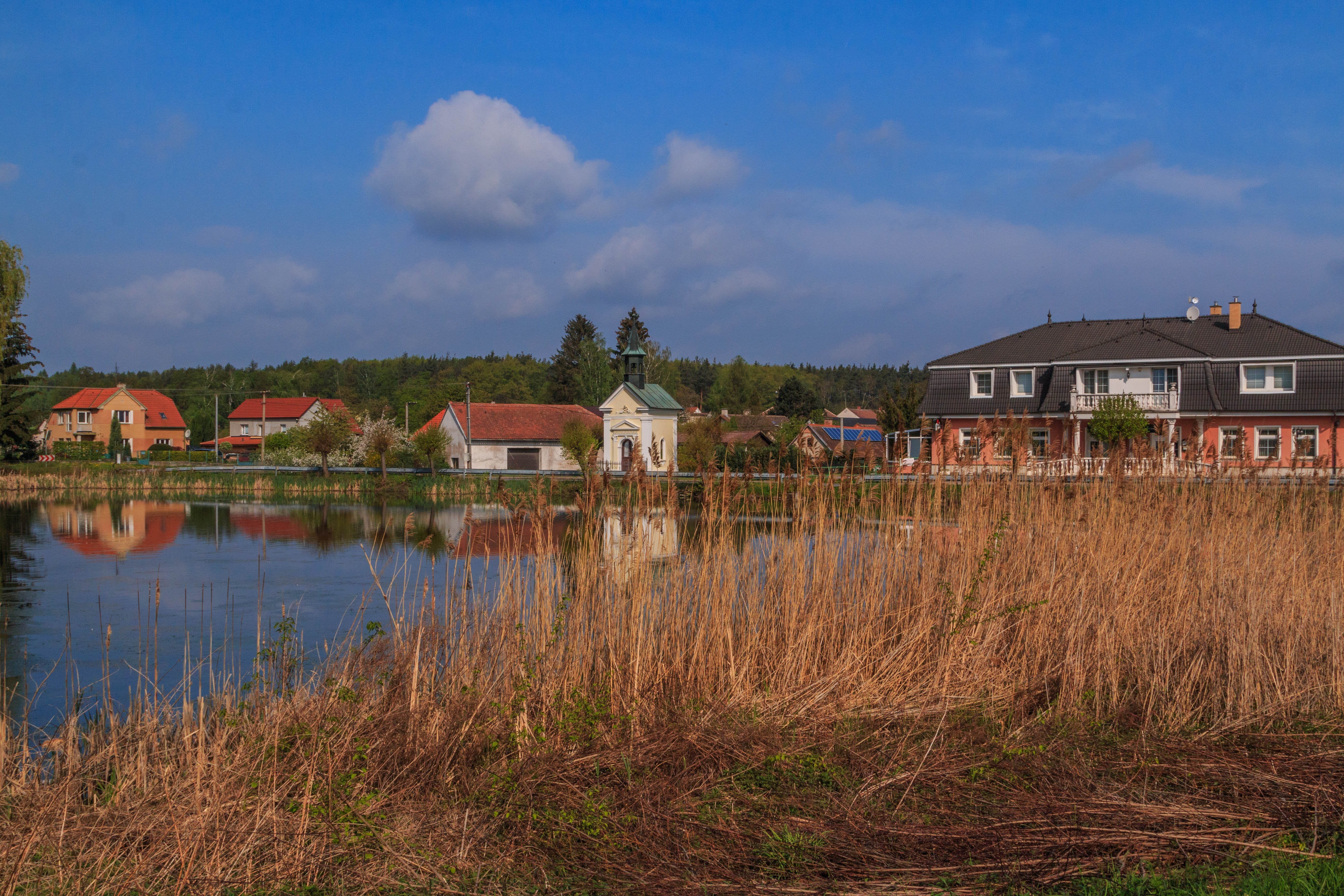 Rybník Návesník ve Veselí u Přelouče Project: Vodstvo.